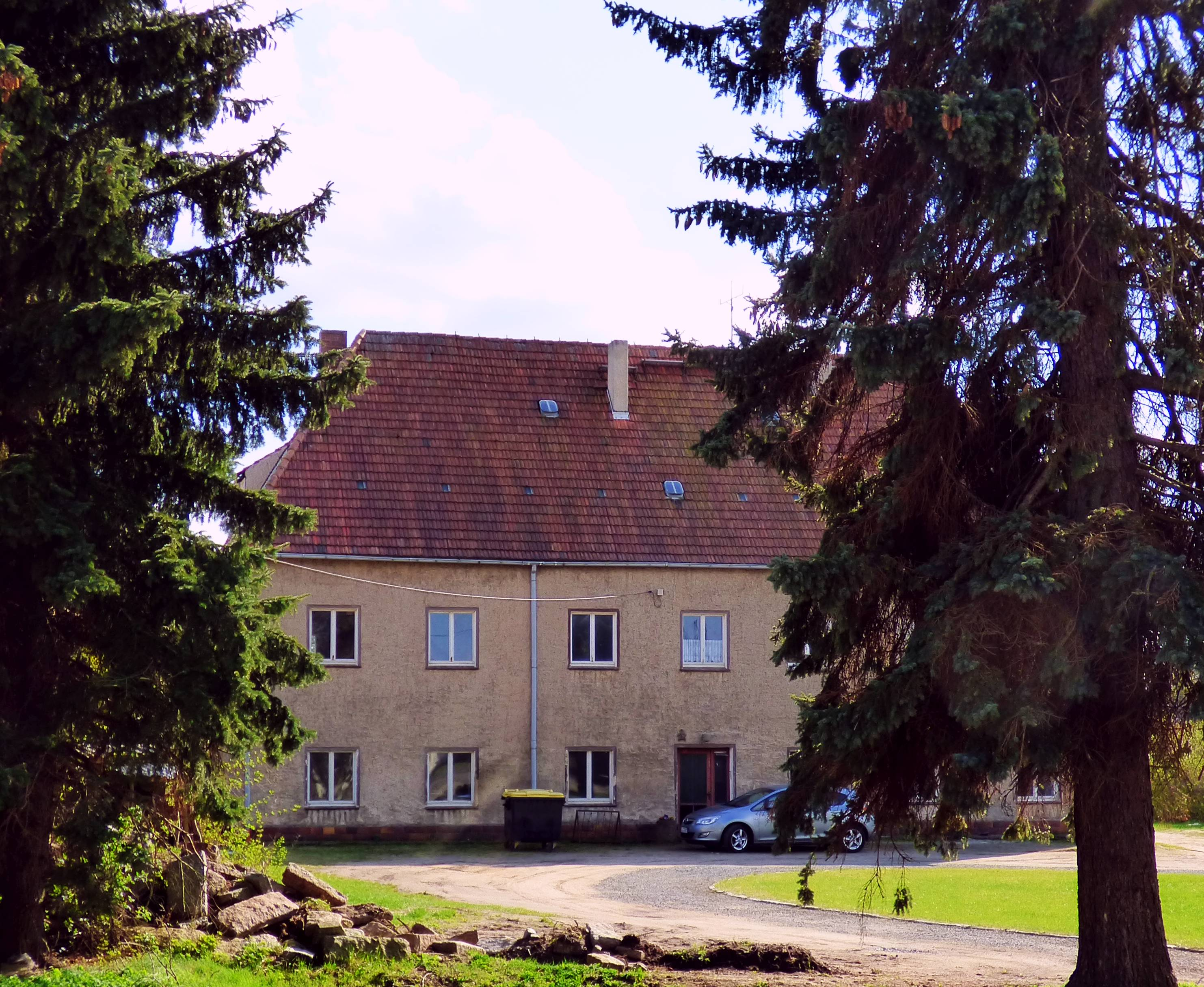 Ehemaliges Rittergut Theisa